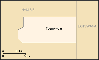 Description:Carte du Bushmanland Auteur:Rémih